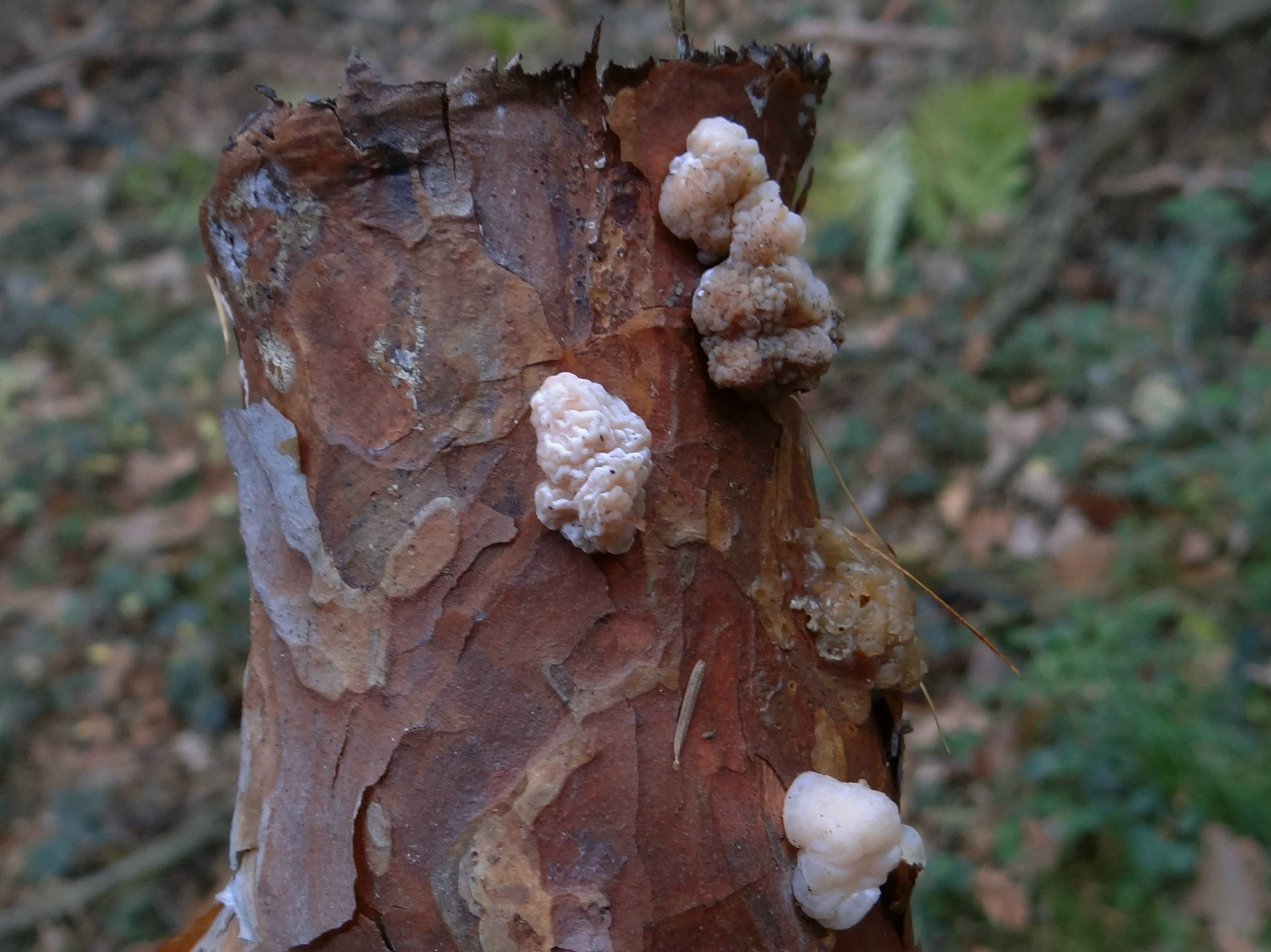 Tremella encephala